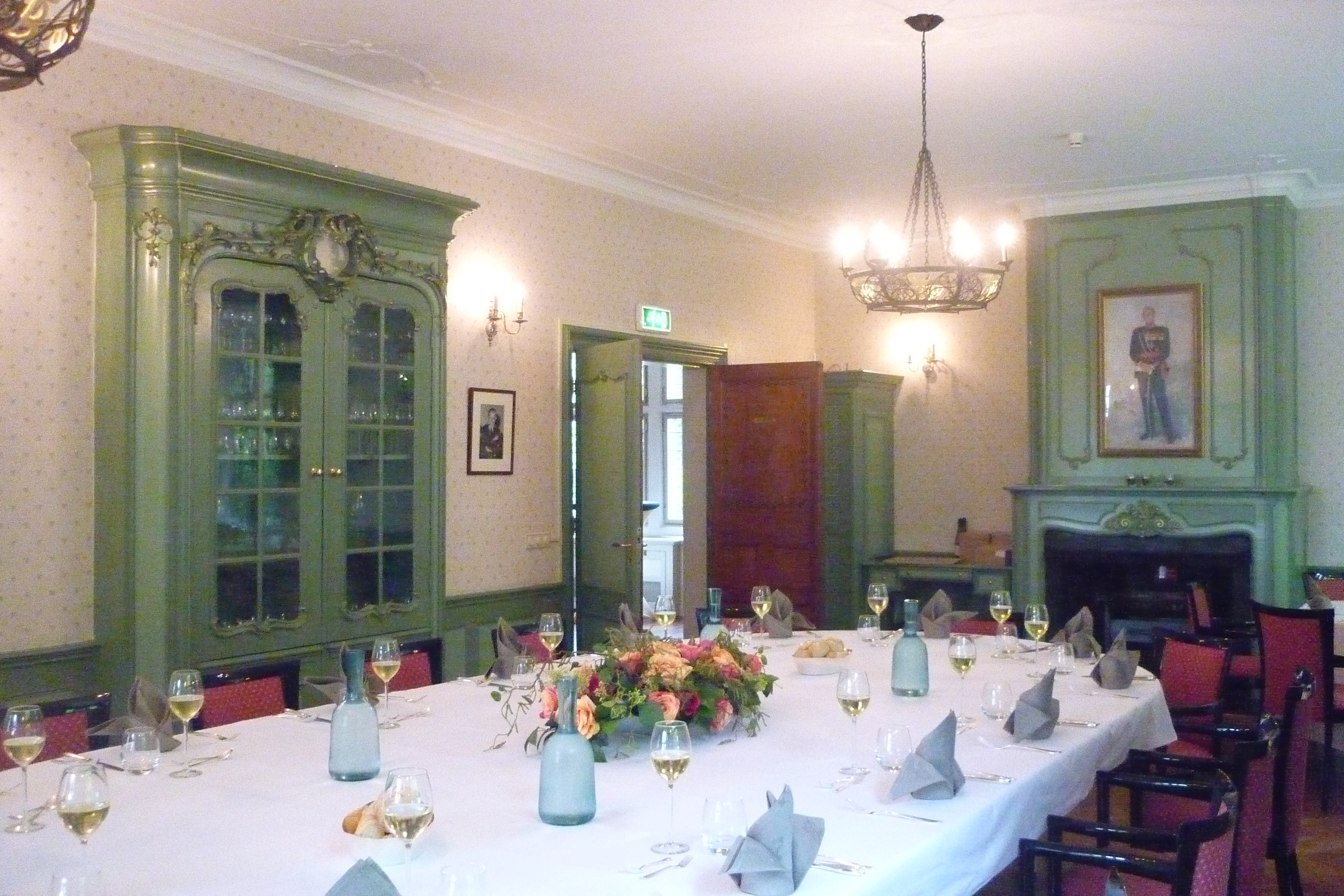 Prins Bernhard-kamer op De Zwaluwenberg